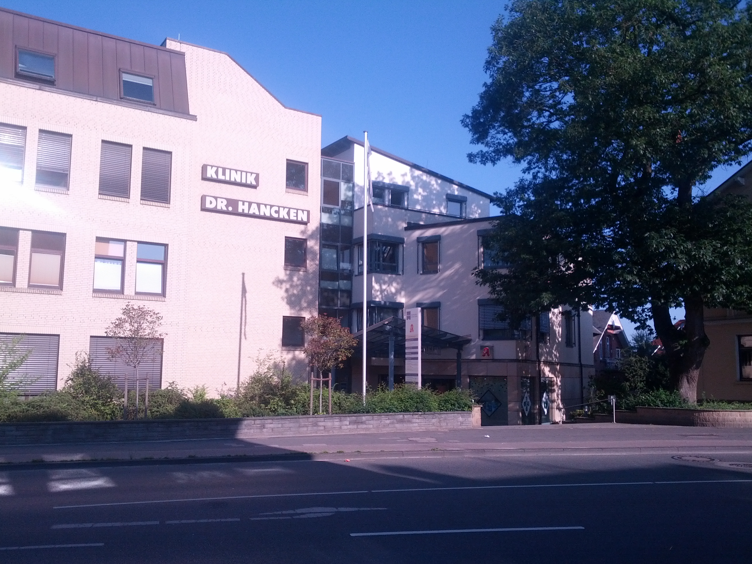 Klinik Dr. Hancken in Stood